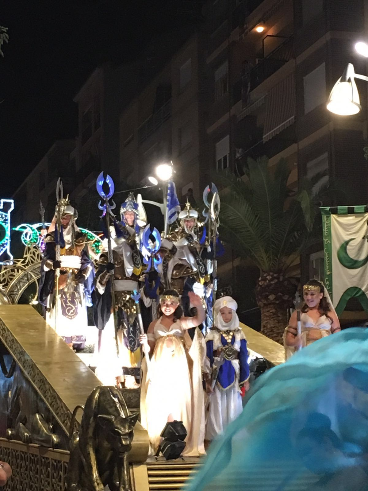 Carrossa de l'Abanderat Moro de la Filà Bequeteros al 2016